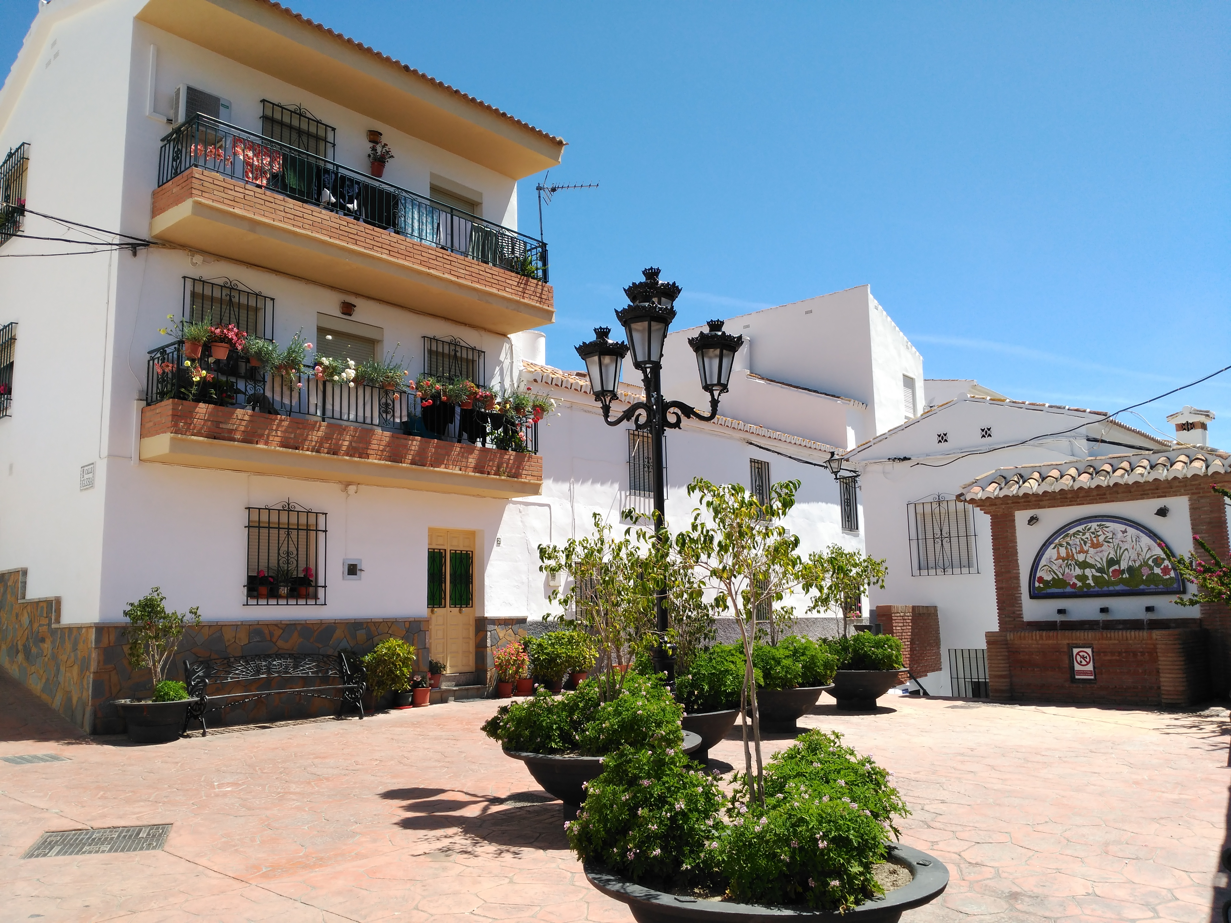 Plaza de la Constitución de Totalán (Málaga).